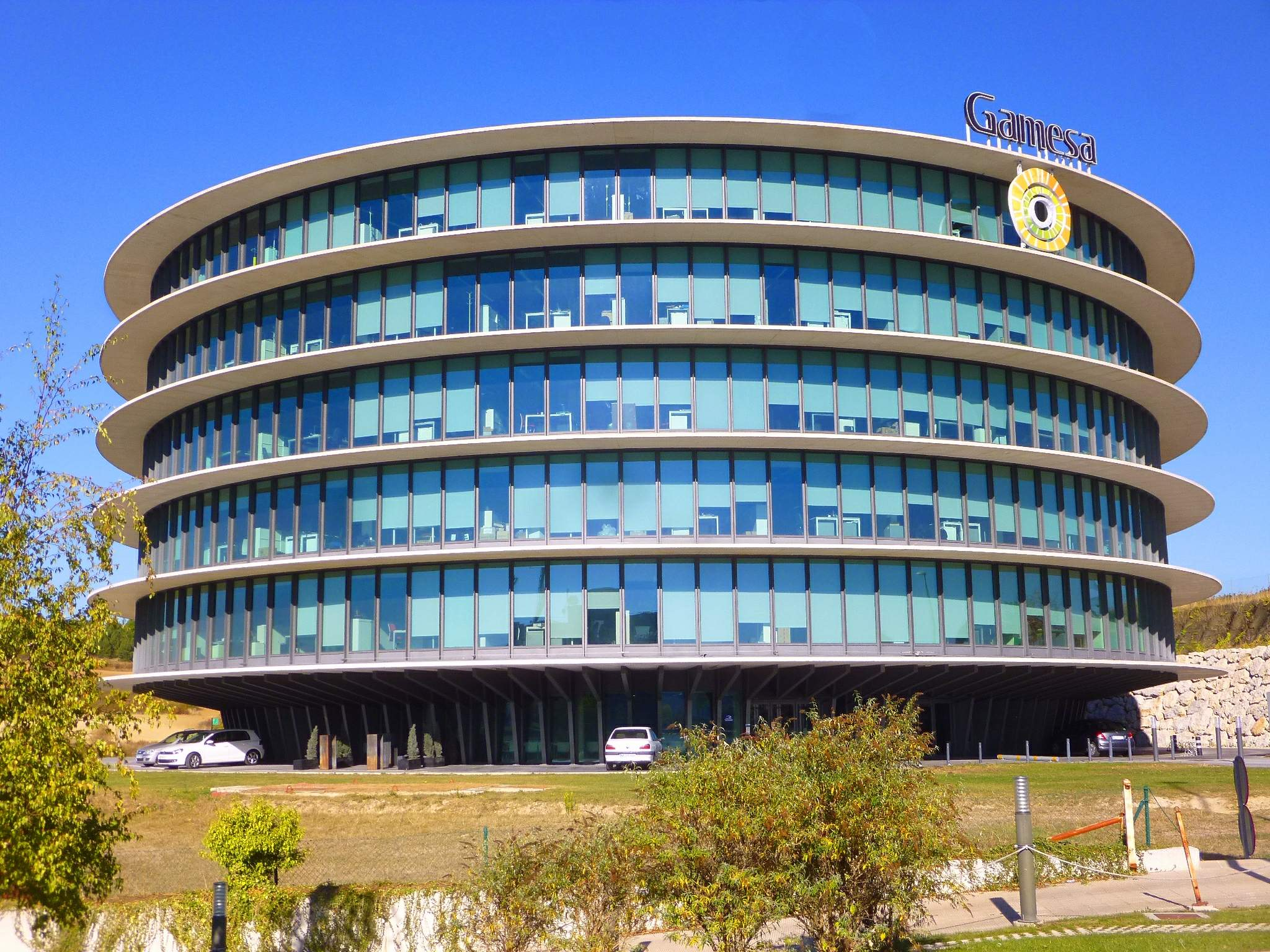 Sarriguren (Egüés) - Parque de la Innovación de Navarra-Enclave Energía y Medio Ambiente, Edificio Gamesa II (inaugurado en 2013)